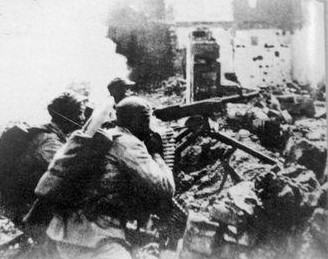 中文（中国大陆）: 第三次长沙会战残垣断壁激烈巷战